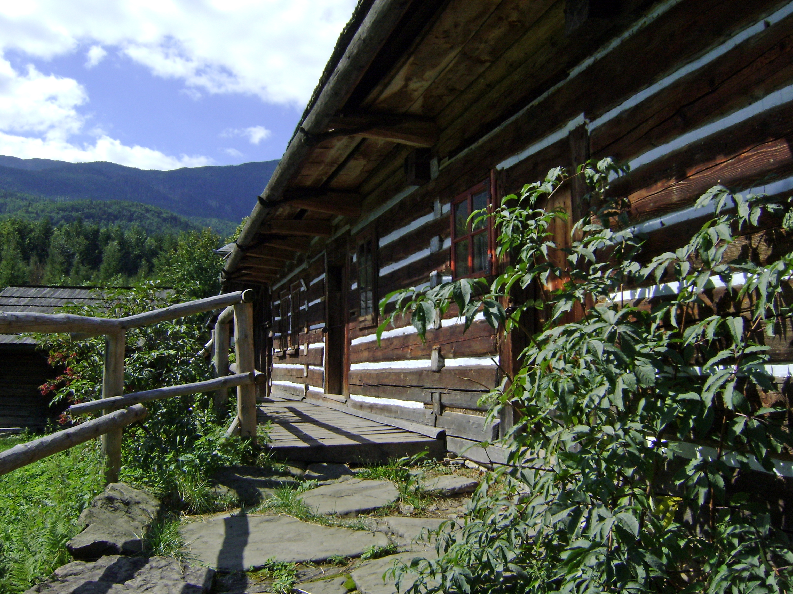 Markowe Rówienki